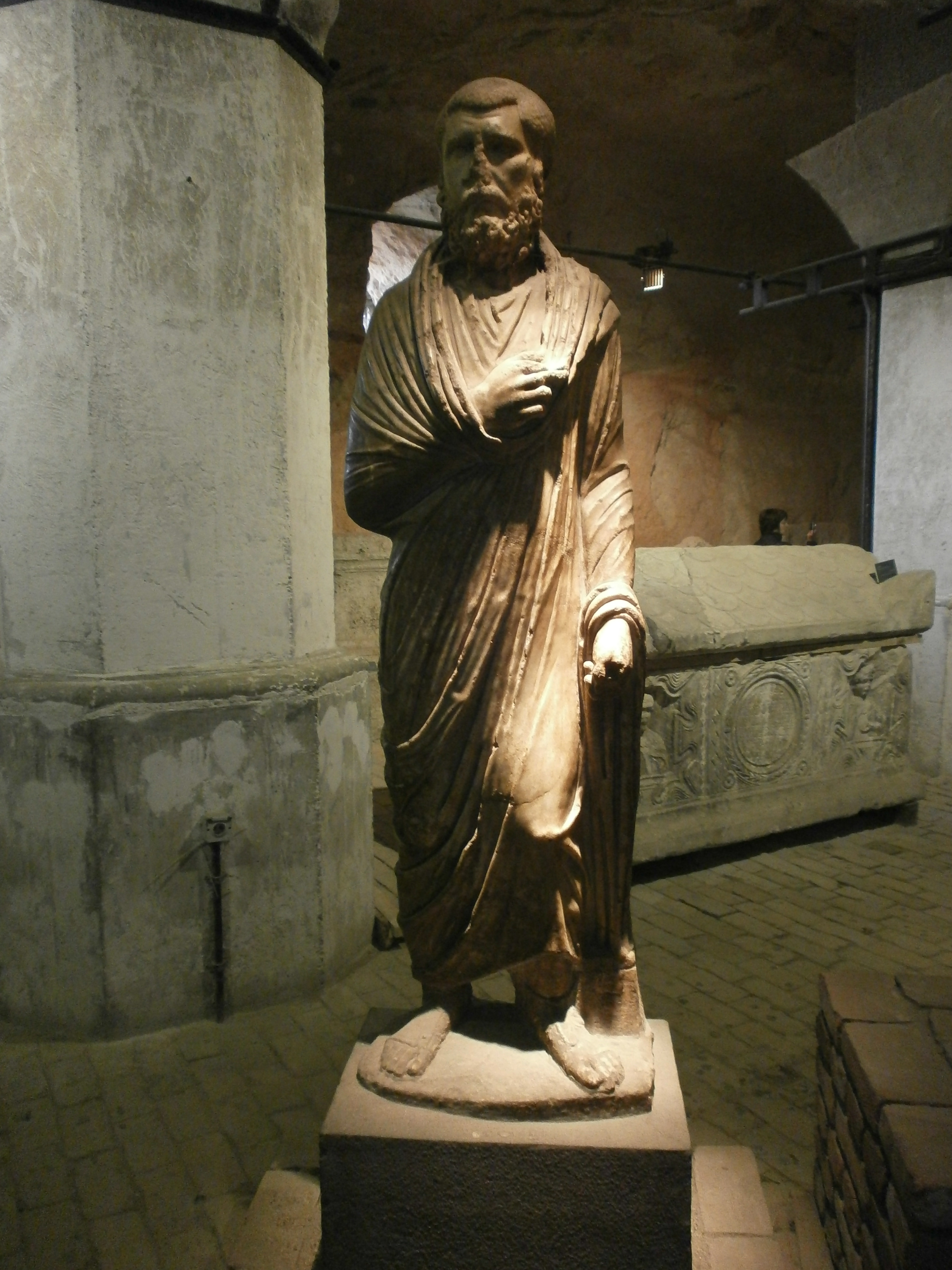 Rimski spomenik